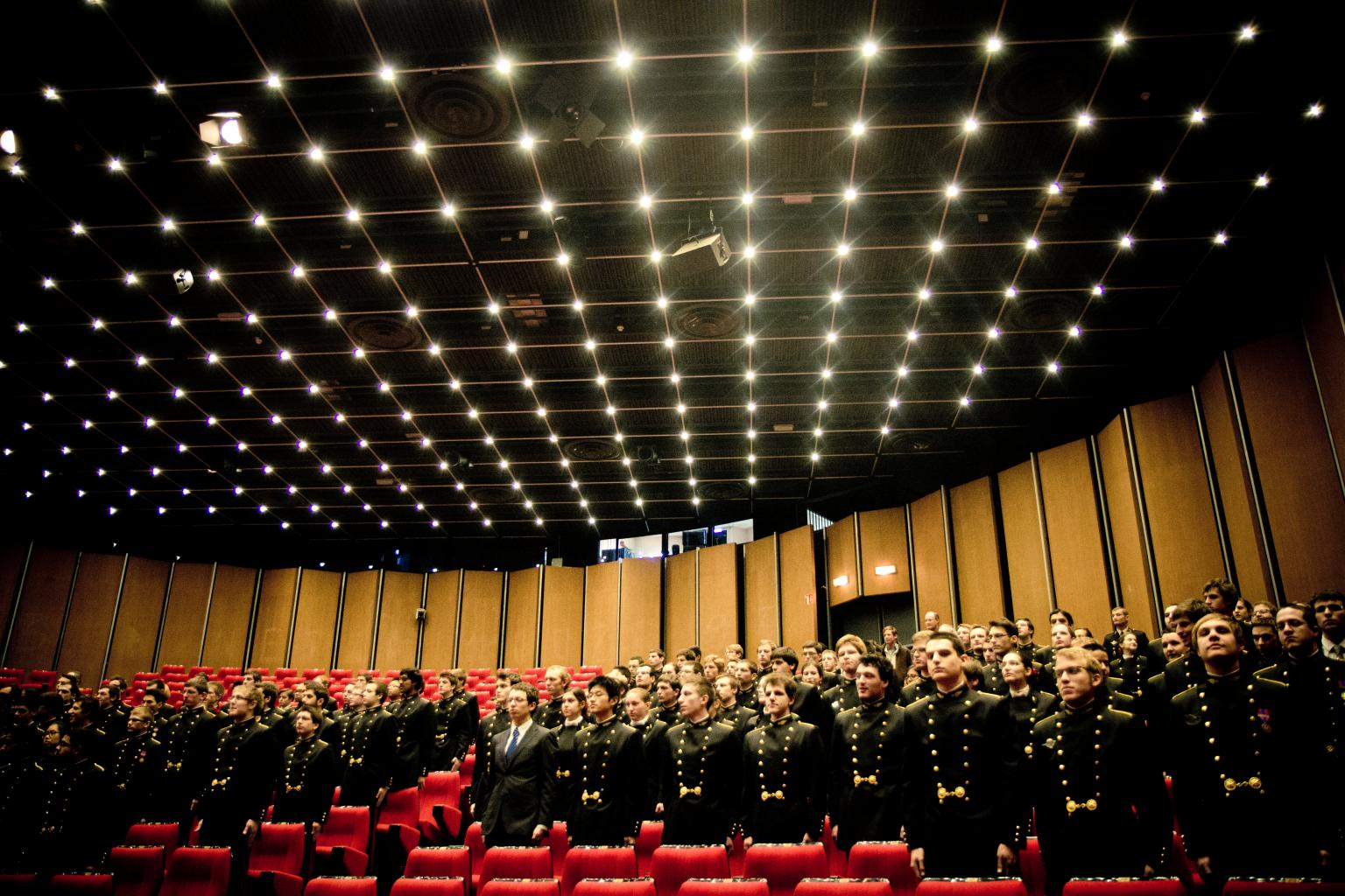 Photo de l'amphithéâtre Poincaré d'une conférence de la direction de la formation humaine et militaire à l'École polytechnique